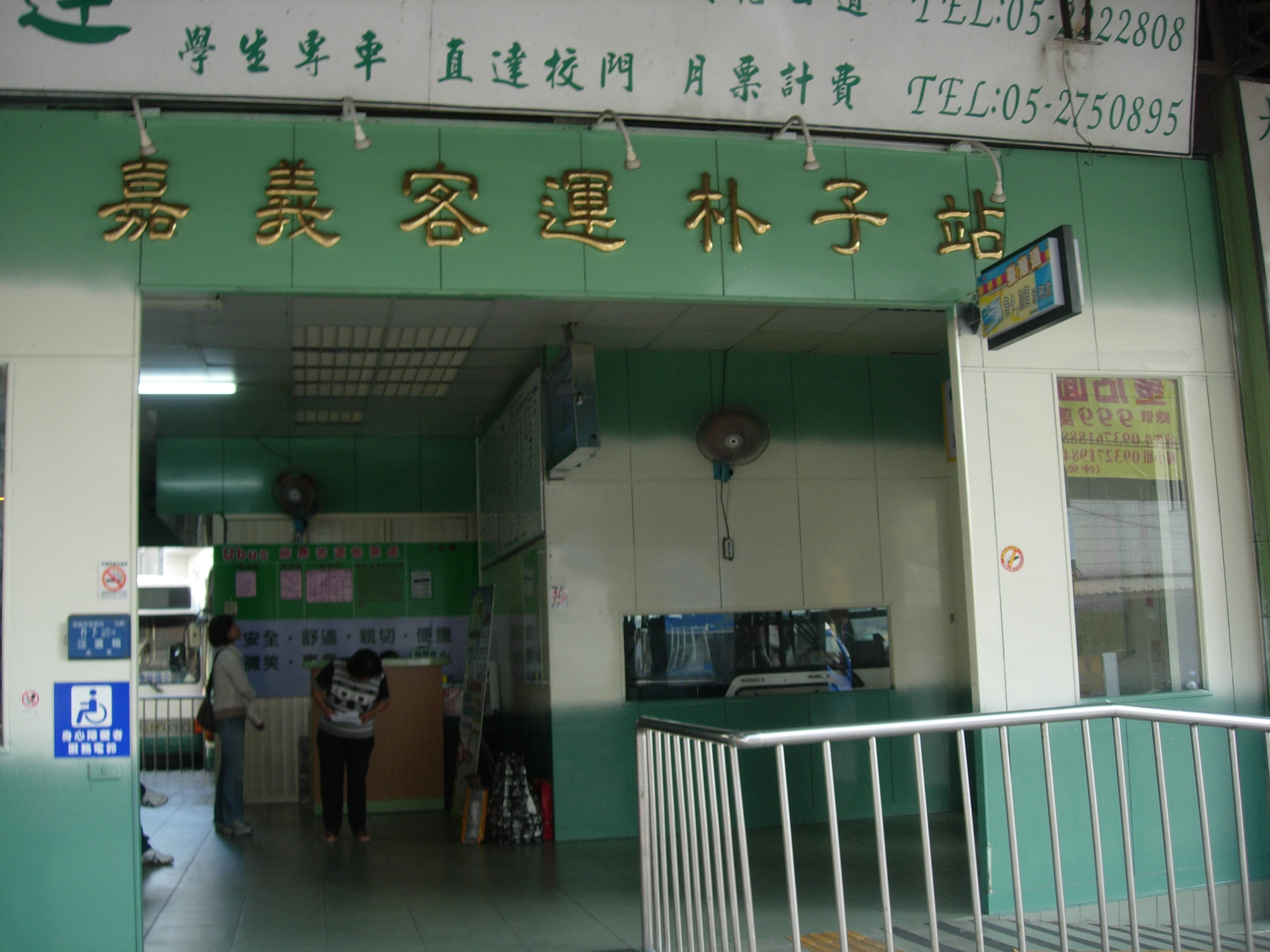 中文（台灣）: 嘉義客運朴子站